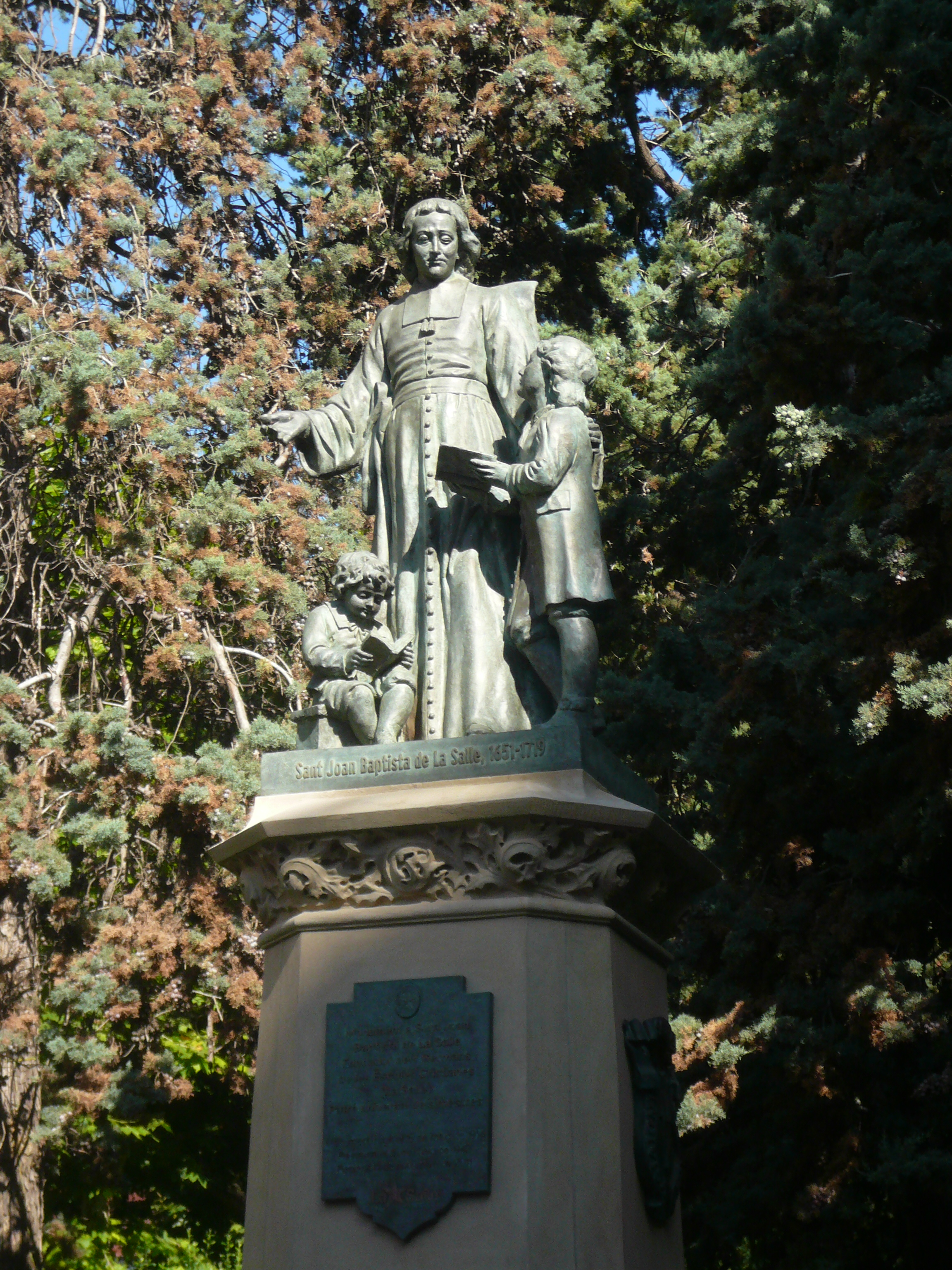 Sant Joan Baptista de La Salle. Pg. de la Bonanova, 8, entrada La Salle Bonanova (Barcelona). Escultor: Alexandre Falguière (còpia), Pere Carbonell (base), Ramon Pericay (reconstrucció). Material: marbre blanc sobre pedestal. 1914, figura reconstruïda c. 1947. 36″ N, 2° 07′ 57.97″ E